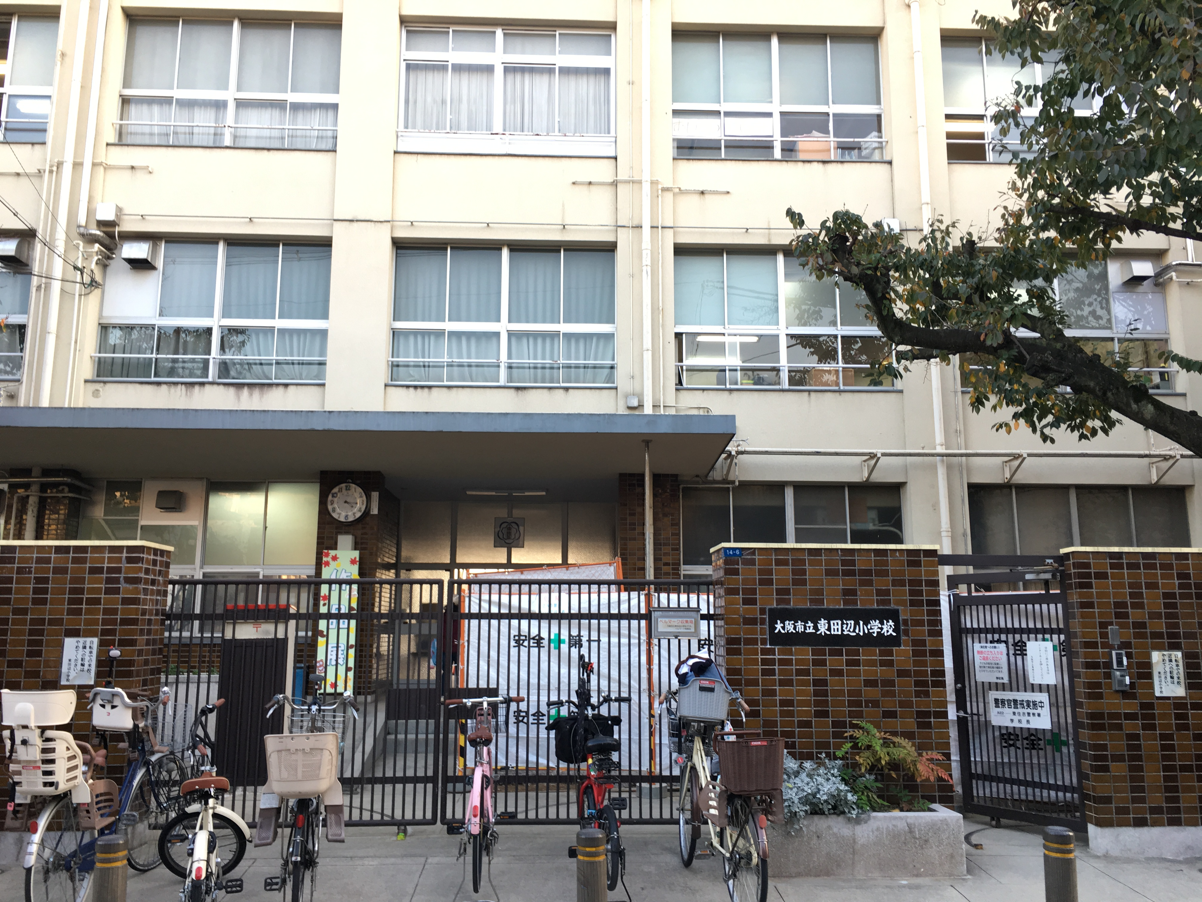 大阪市立東田辺小学校